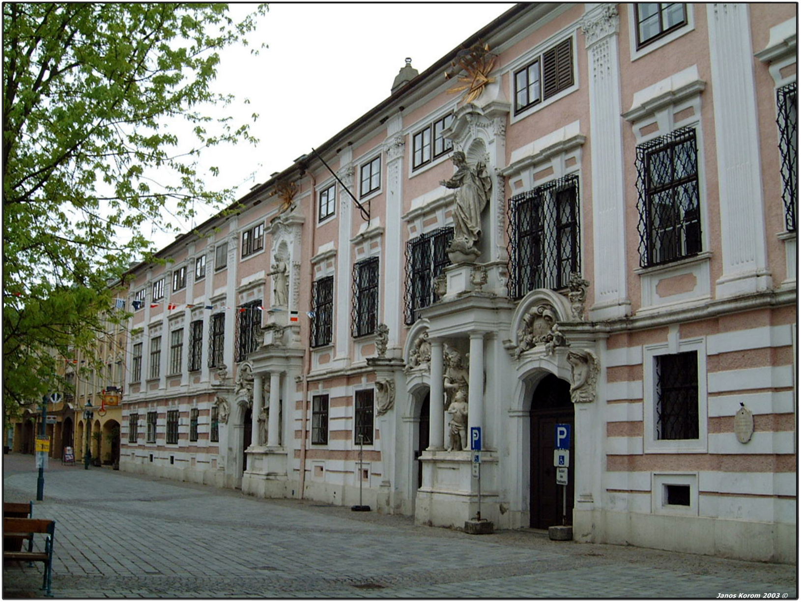 Sankt Pölten (3) St. Pölten, Lower Austria